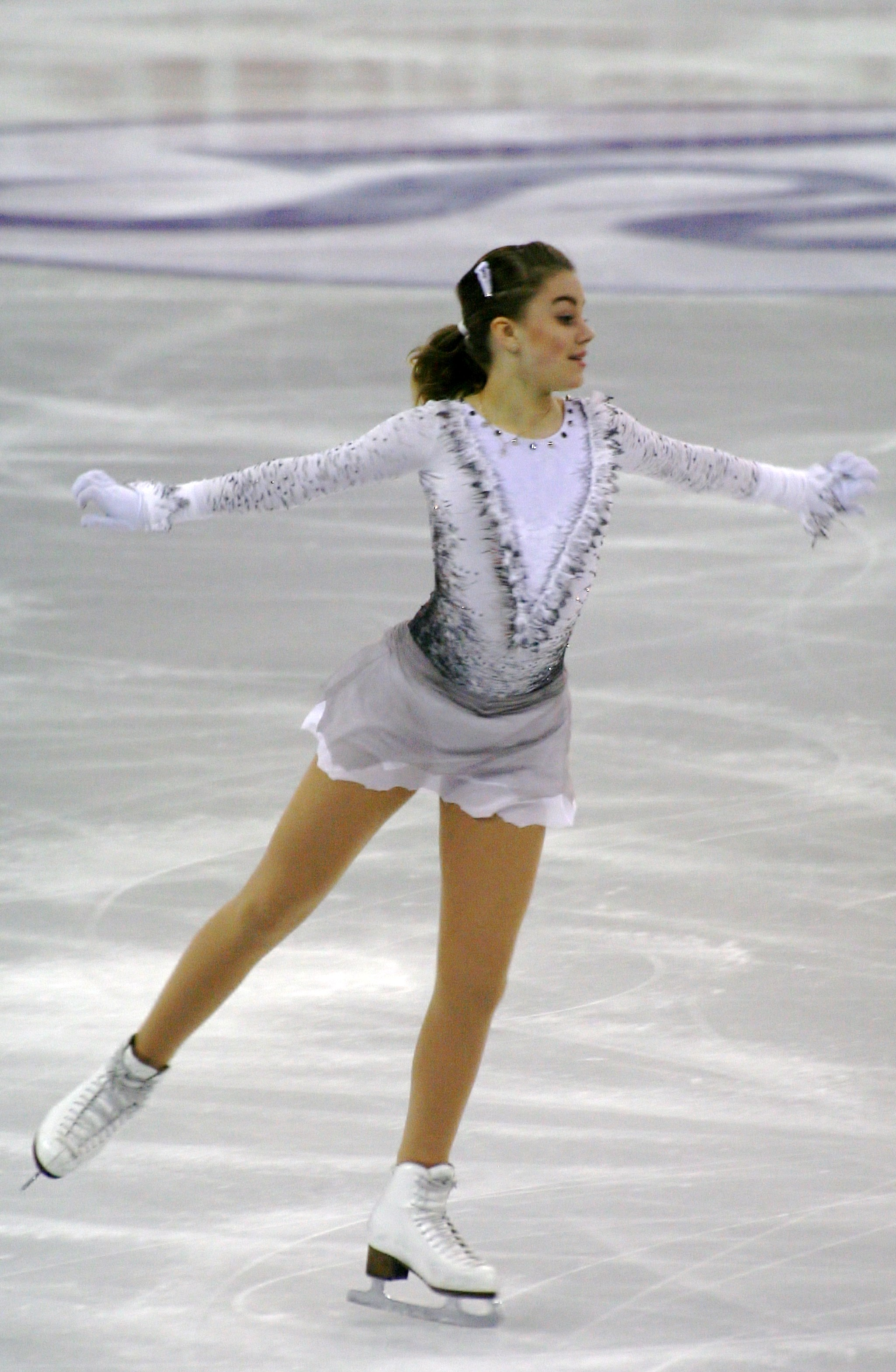 Алиса Федичкина (Россия) на финале Гран-при по фигурному катанию среди юниоров 2015-2016